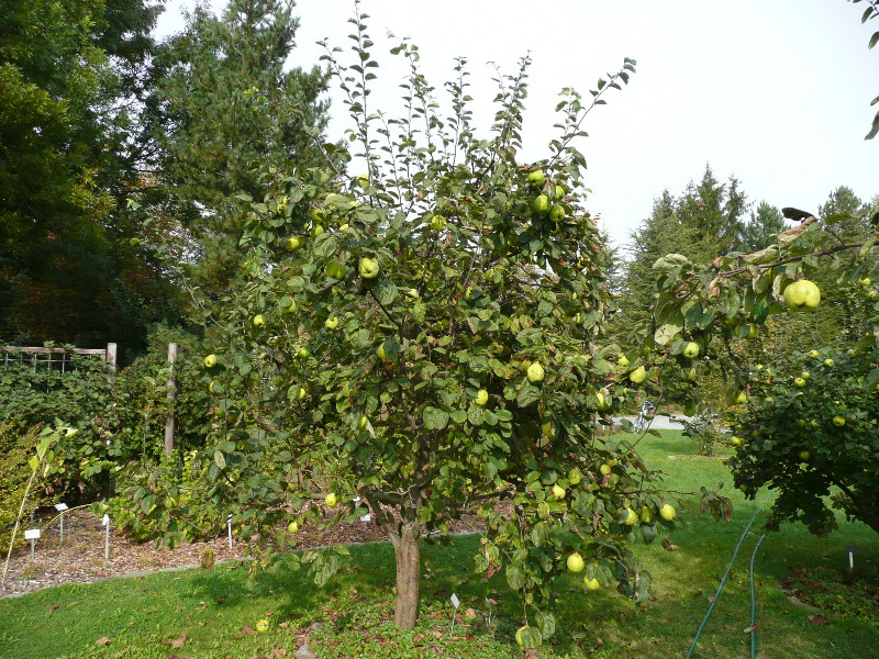 Cydonia oblonga cv. 'Portugiesische Birnenquitte'